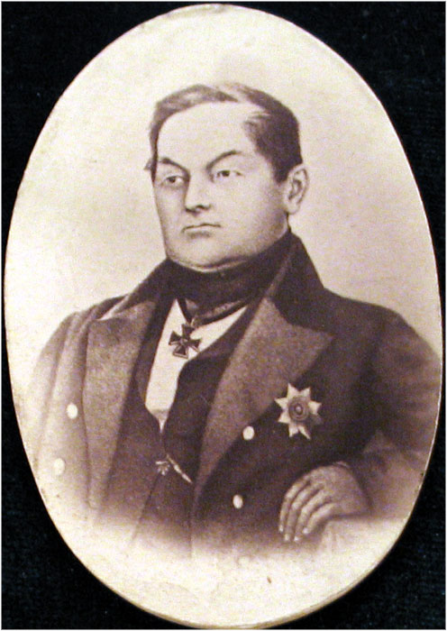 Портрет ректора Казанского университета, русского астронома Ивана Михайловича Симонова. Автор неизвестен, дагерротип, около 1850 года.